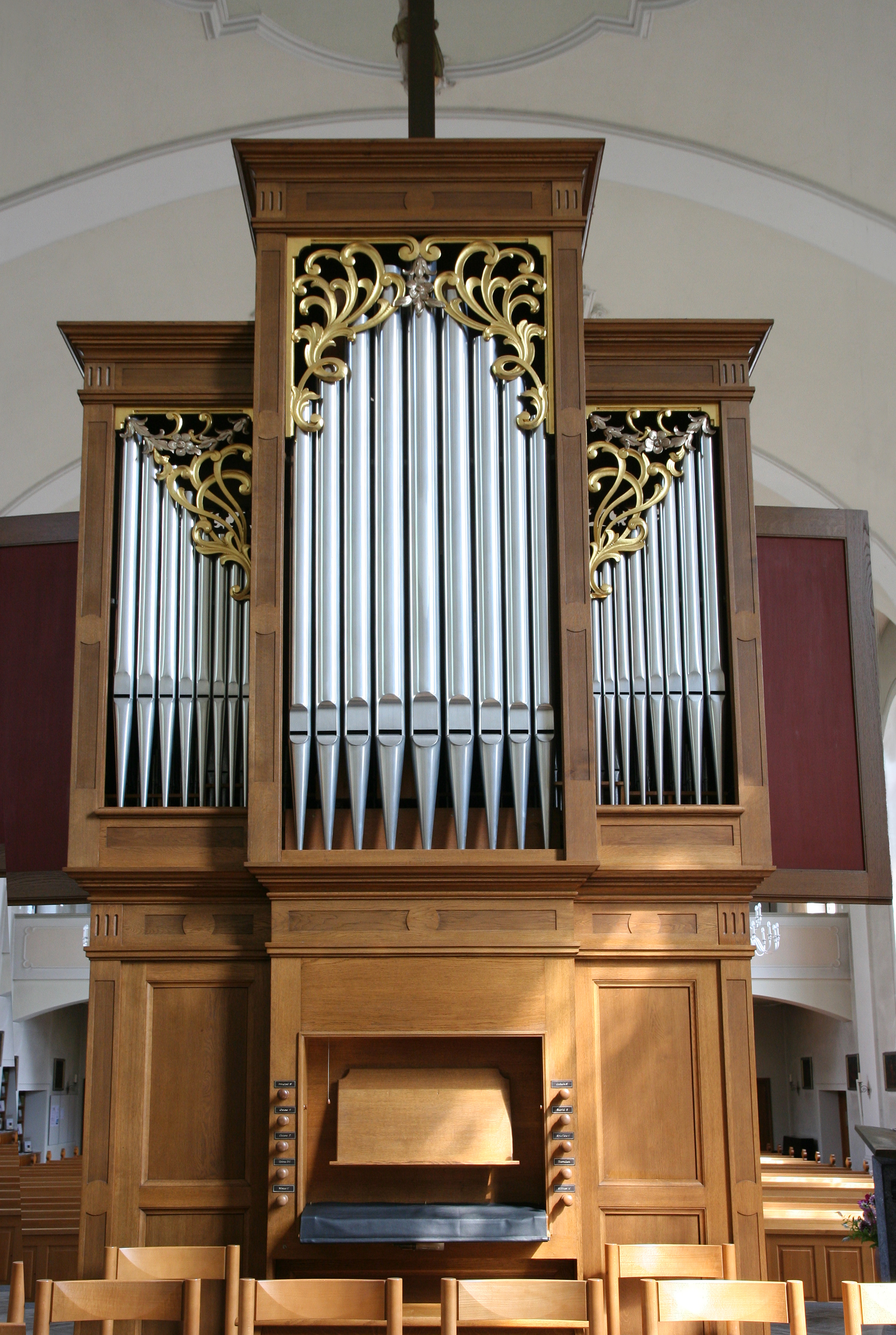 Römisch-katholische Pfarrkirche St. Felix und Regula Thalwil, Chororgel